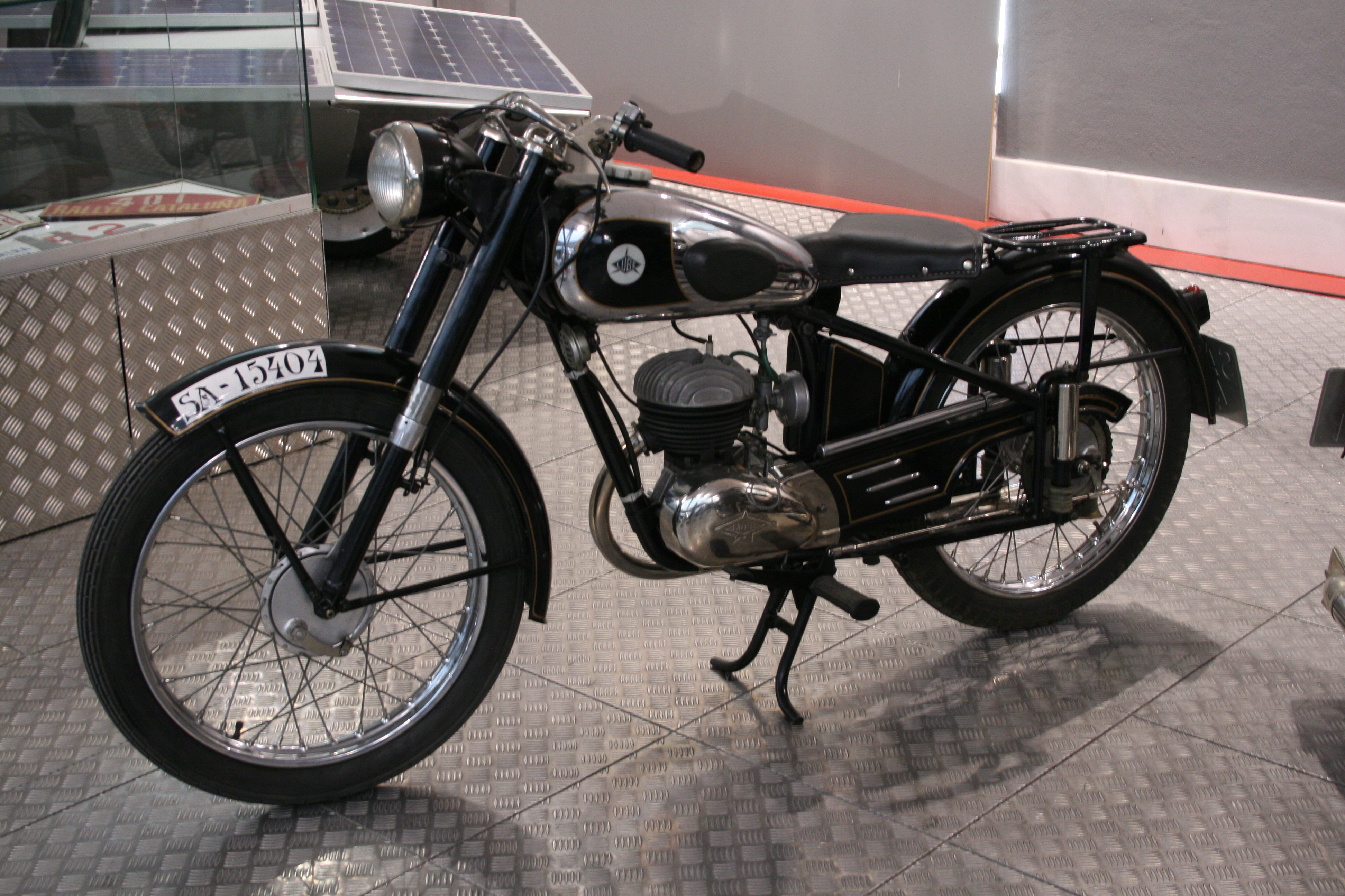 Lube Motorcycles Museo de Historia de la Automoción de Salamanca Native nameMuseo de Historia de la Automoción (Salamanca)LocationSalamanca, (Spain)Coordinates40° 57′ 29.73″ N, 5° 40′ 00.95″ W Established2002Web page control : Q6034050 institution QS:P195,Q6034050